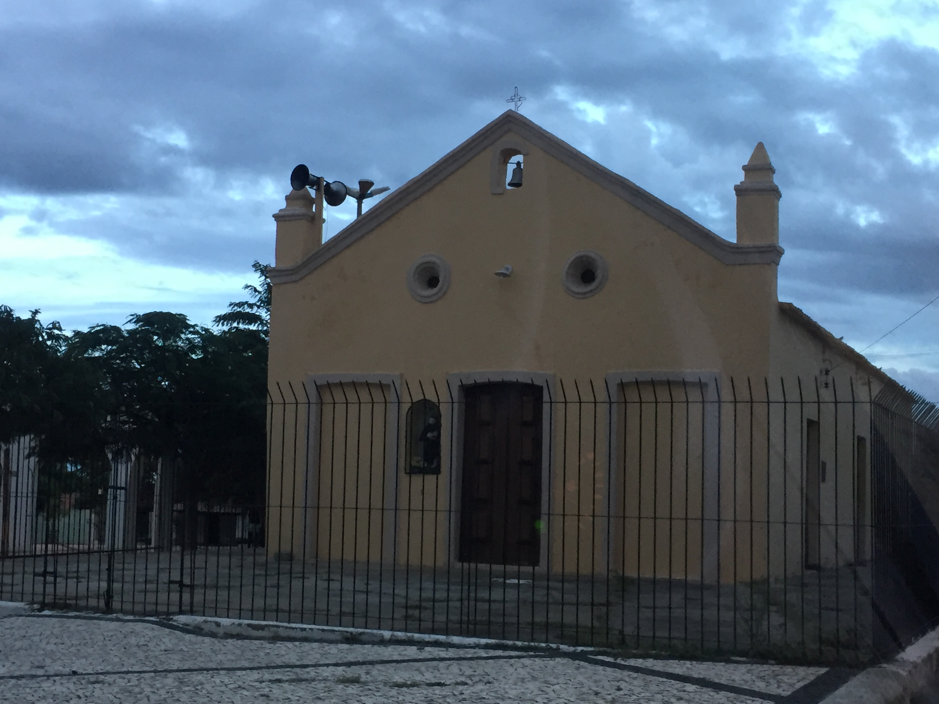 Capela de São Francisco da Califórnia, localizada no Distrito do município de Quixadá, Ceará, Brasil, construída em 1855.